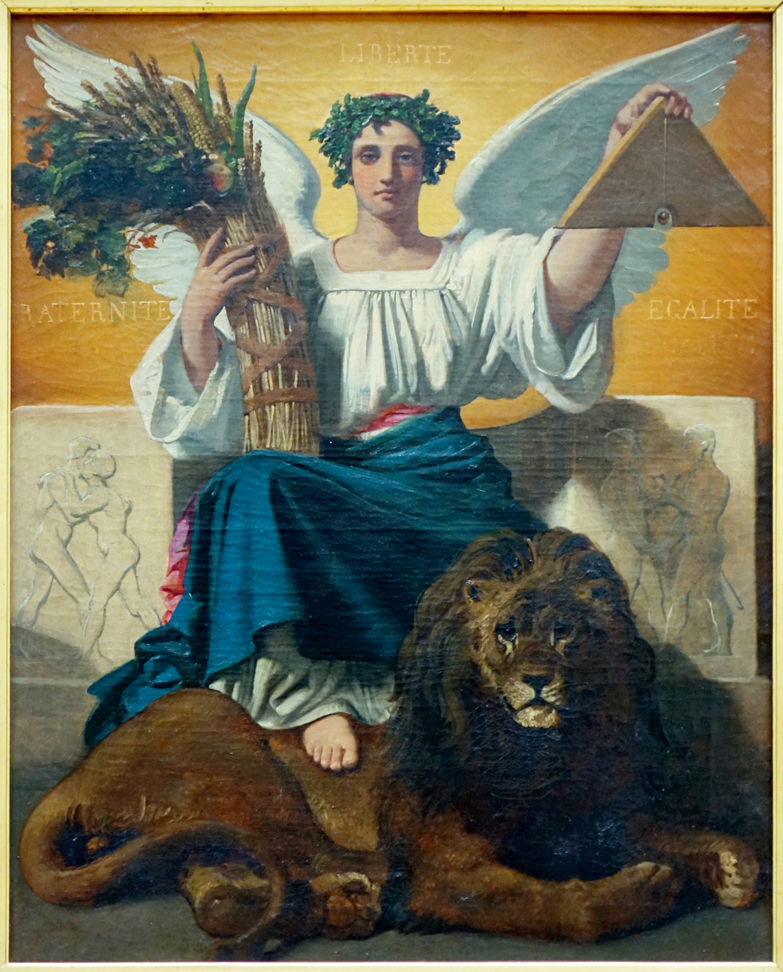 La République au palais des beaux-arts de Lille.